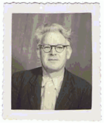 Adhémar Hennaut n'est déjà plus militant à cet âge. Il doit avoir atteint la cinquantaine. KAPANCI Sam, Entre sociologie et histoire. Parcours d’un militant communiste, Adhémar Hennaut, ULB (mémoire de maîtrise), Bruxelles, 2013, p. 53